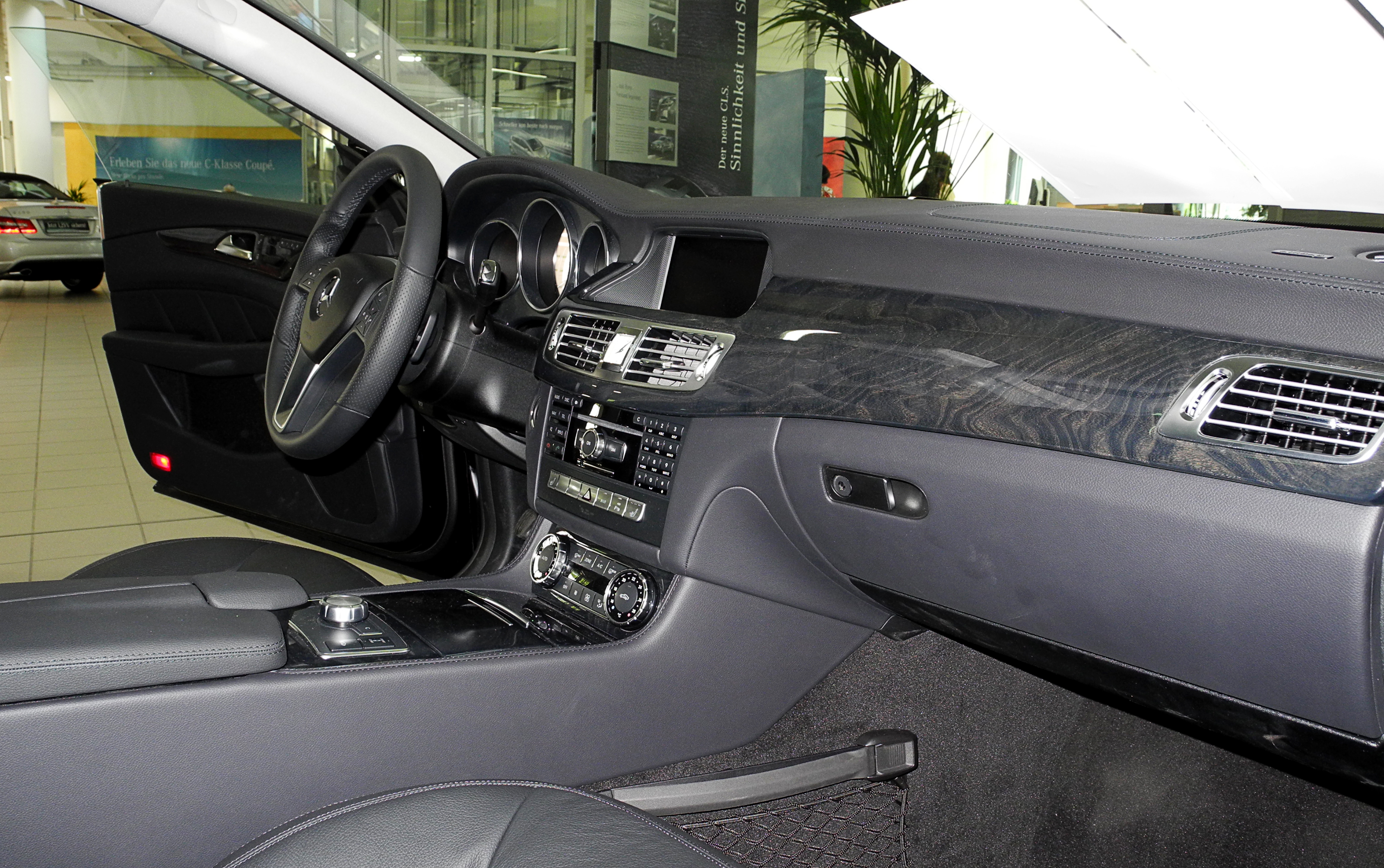 Mercedes-Benz CLS 350 BlueEFFICIENCY (C 218)